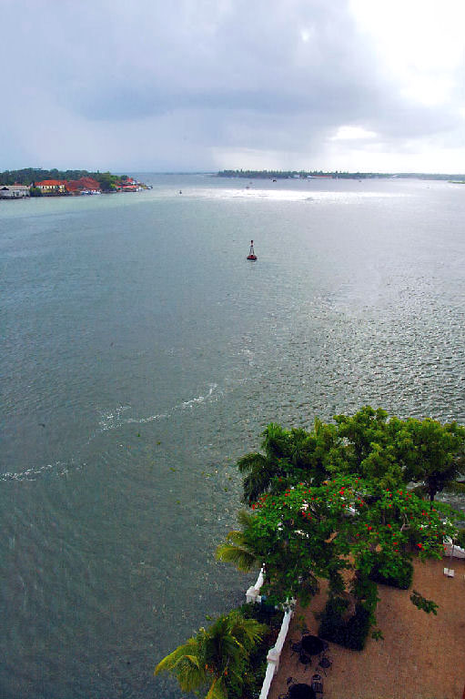 വെല്ലിങ്ടൺ ദ്വീപിലെ താജ് മലബാർ ഹോട്ടലിൽ നിന്ന് കൊച്ചി നഗരത്തിലേക്കുള്ള വീക്ഷണം